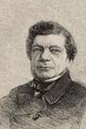 litho ter gelegenheid van het 50-jarig bestaan van Artis in 1888 (detail afbeelding J.J. Wijsmuller